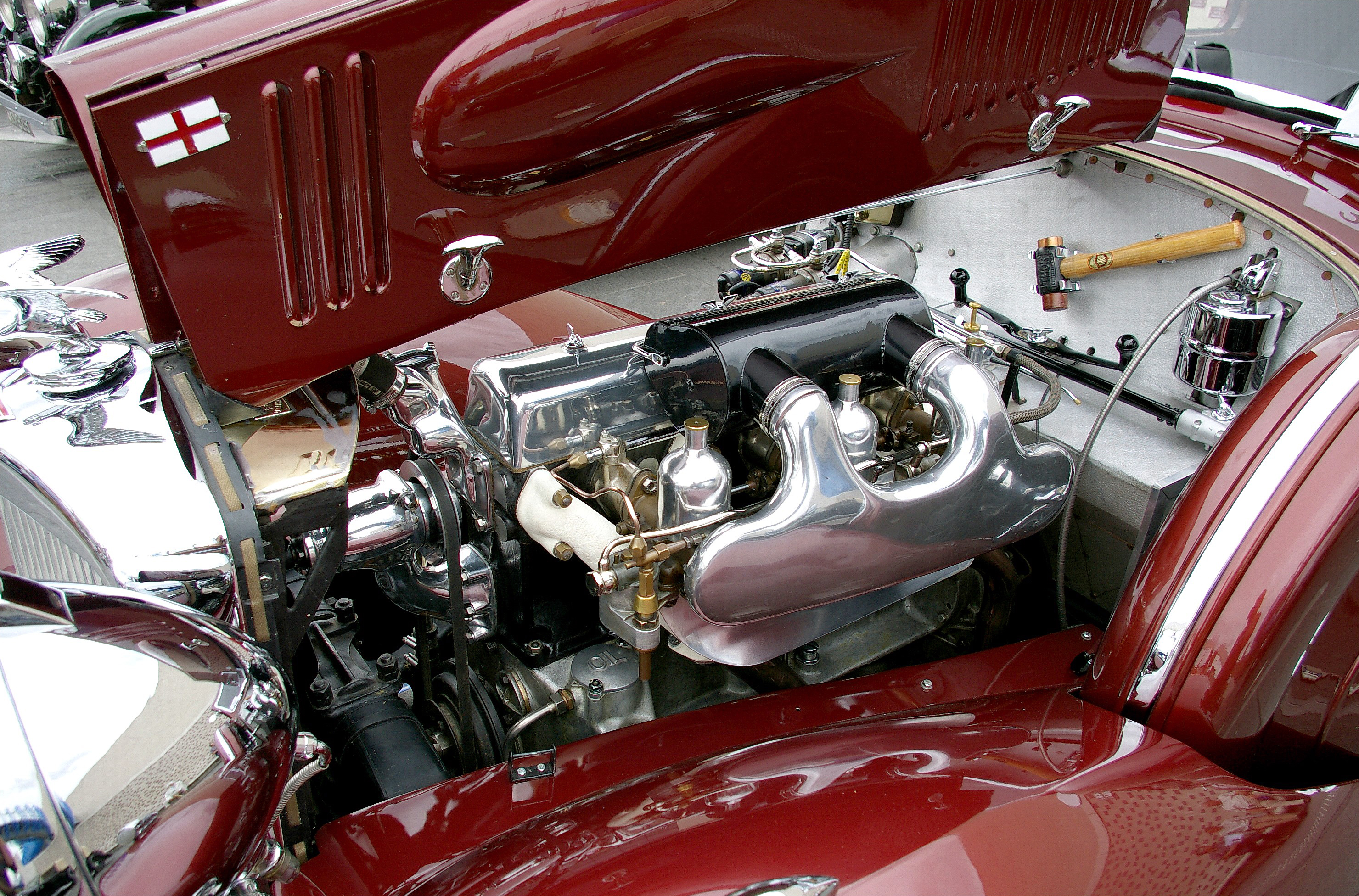 Alvis Speed 25 engine